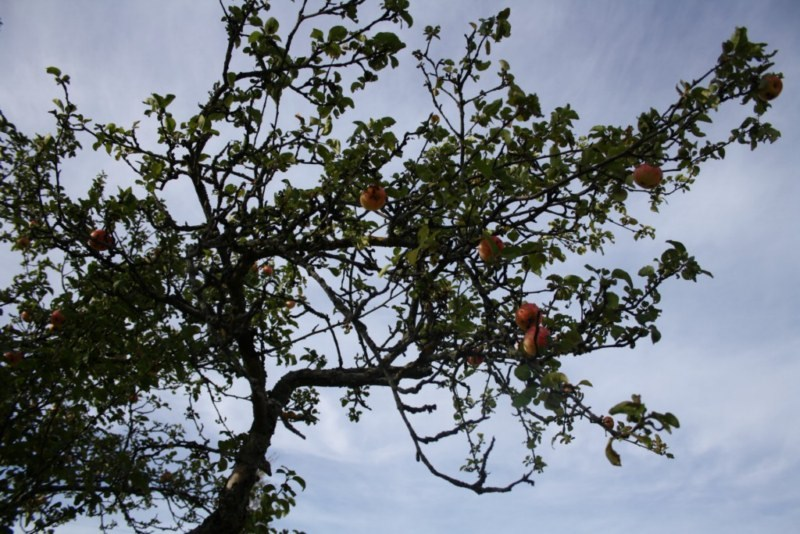 Tunaäpplen på moderträdet i Domnarvet